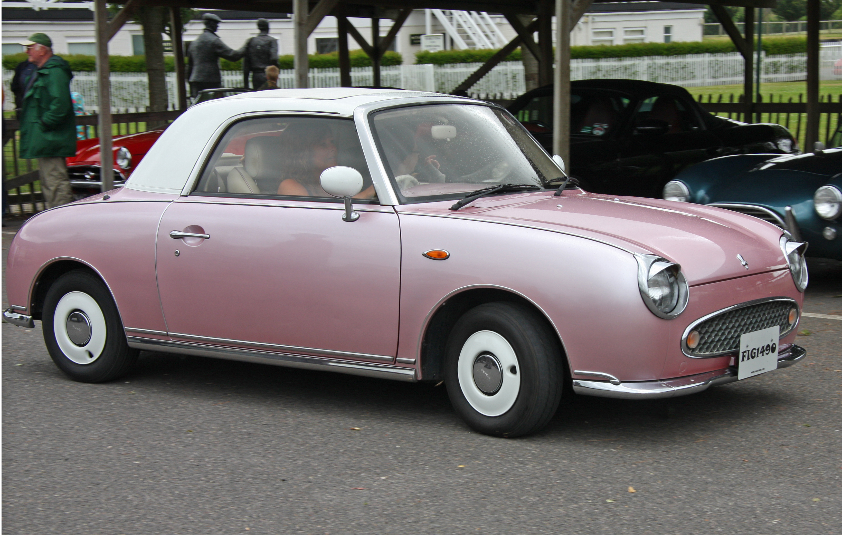 Nissan Figaro